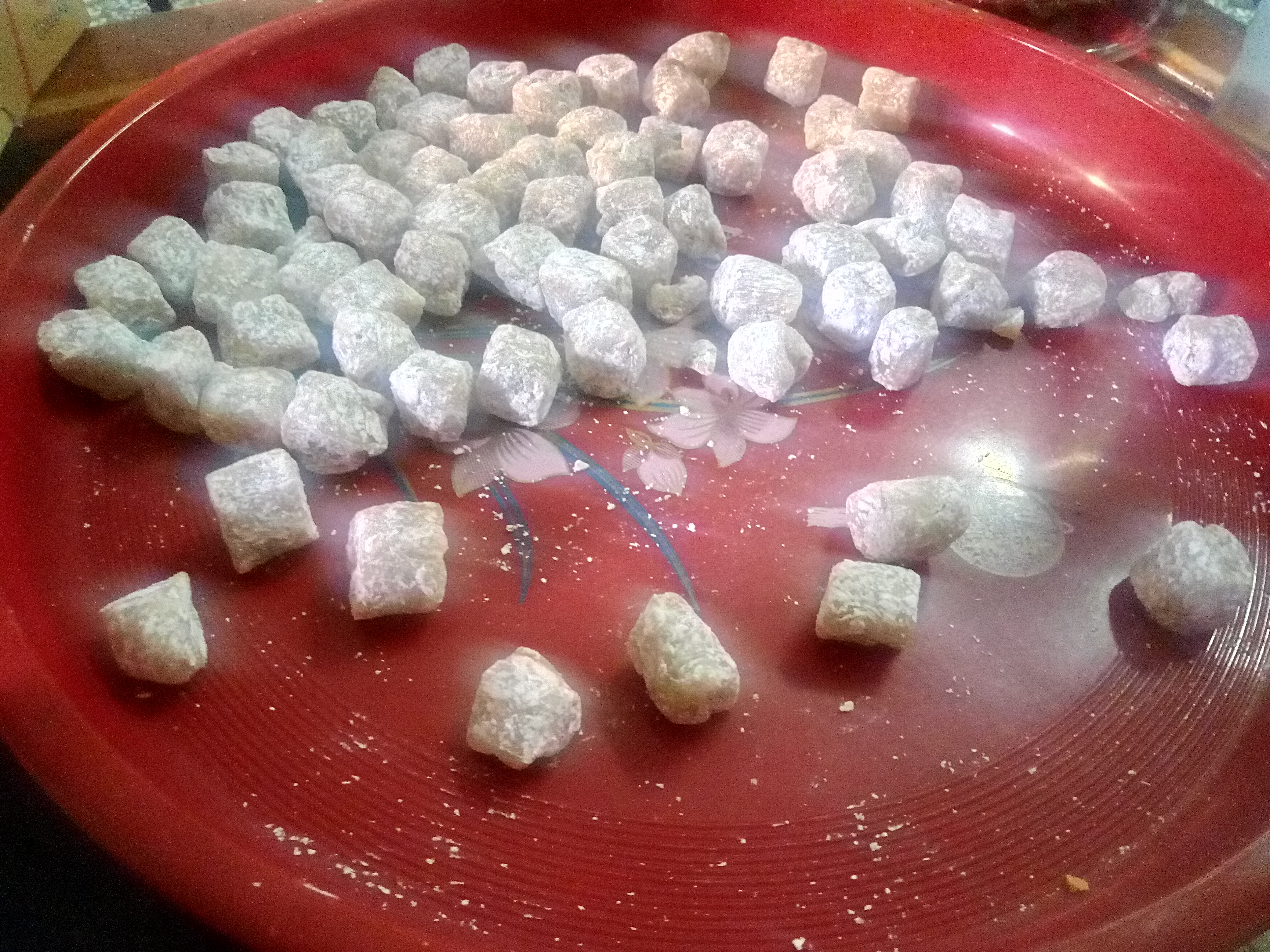 嘉義の新港飴